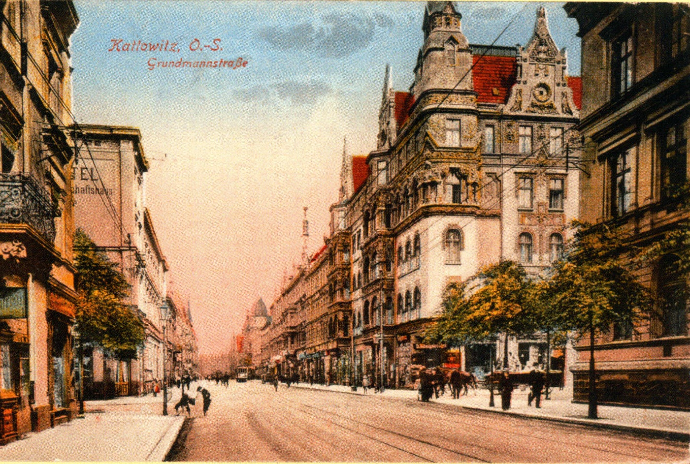 Kamienica ul 3 Maja 40 Katowice, 1921 r